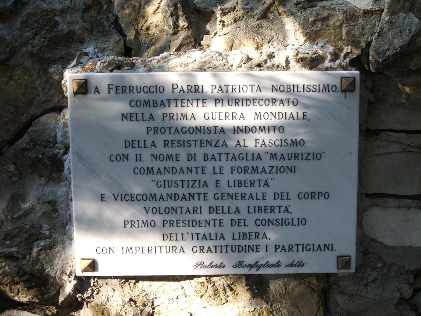 Cimitero monumentale di Staglieno, Genova. Tomba di Ferruccio Parri.